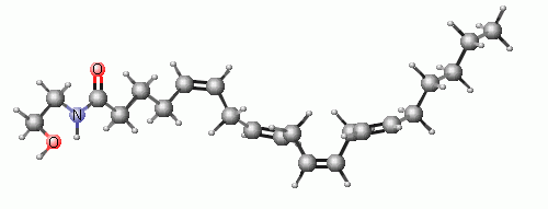 Struttura chimica di un anandamide - creata da Soddi tramite il programma ChemIDplus. - ChemIDplus is a free, web-based search system that provides access to structure and nomenclature authority files used for the identification of chemical substances cited in National Library of Medicine (NLM) databases.